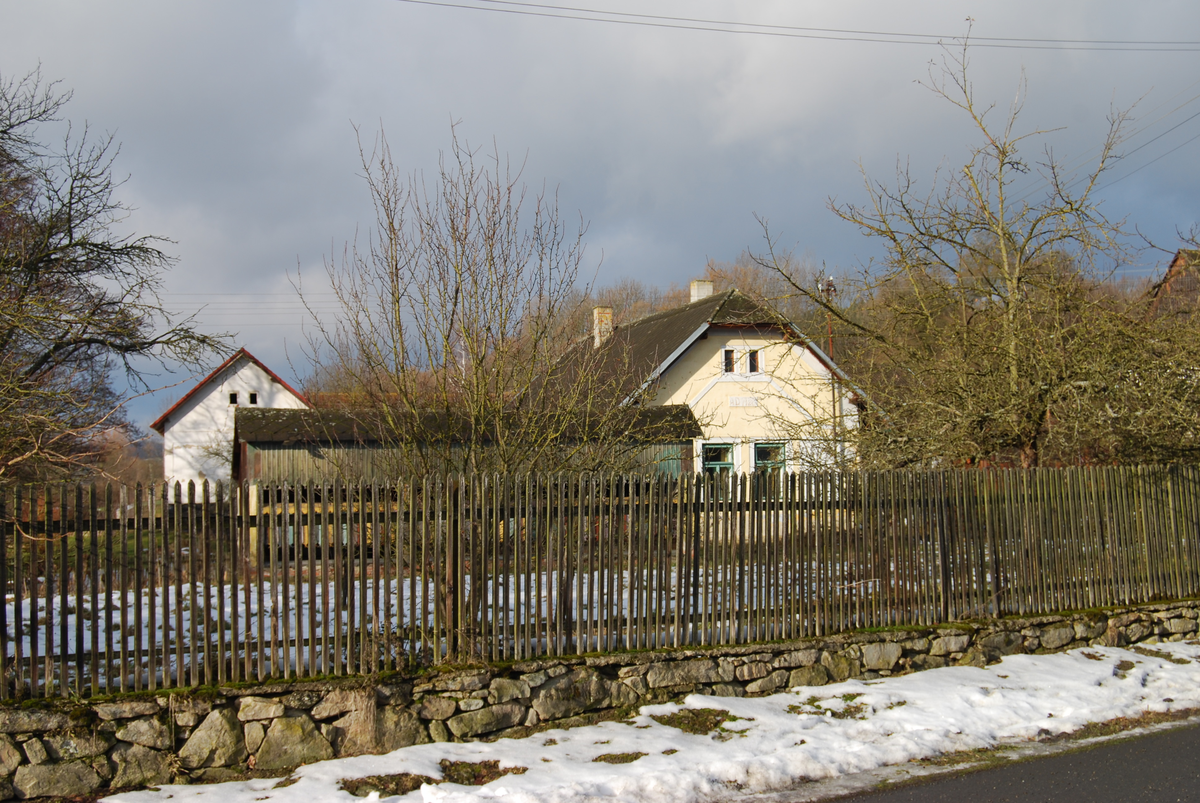 Pohled na část vesnice. Radihošť je část obce Božetice v okrese Písek. Česká republika.